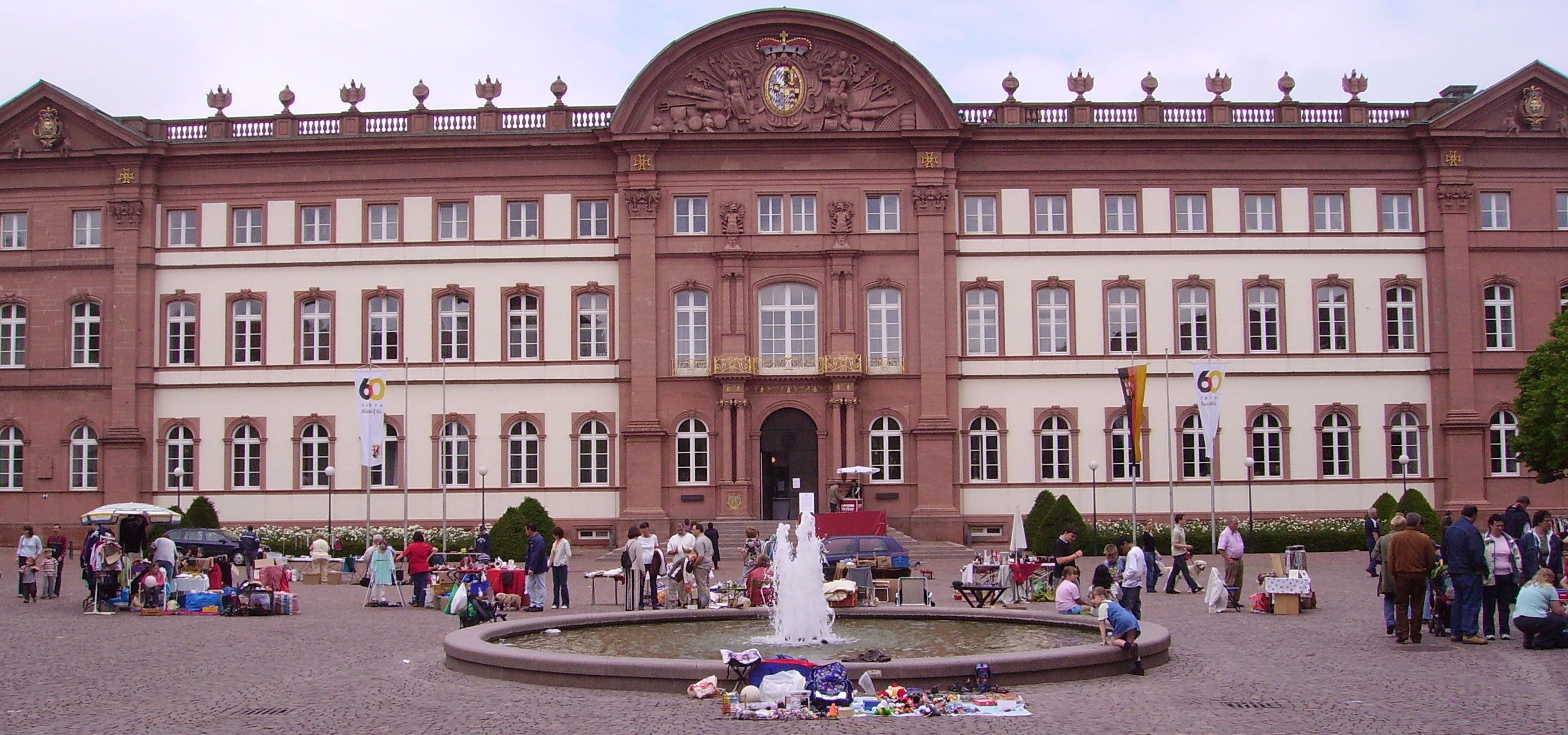 view of Zweibrücken, Germany